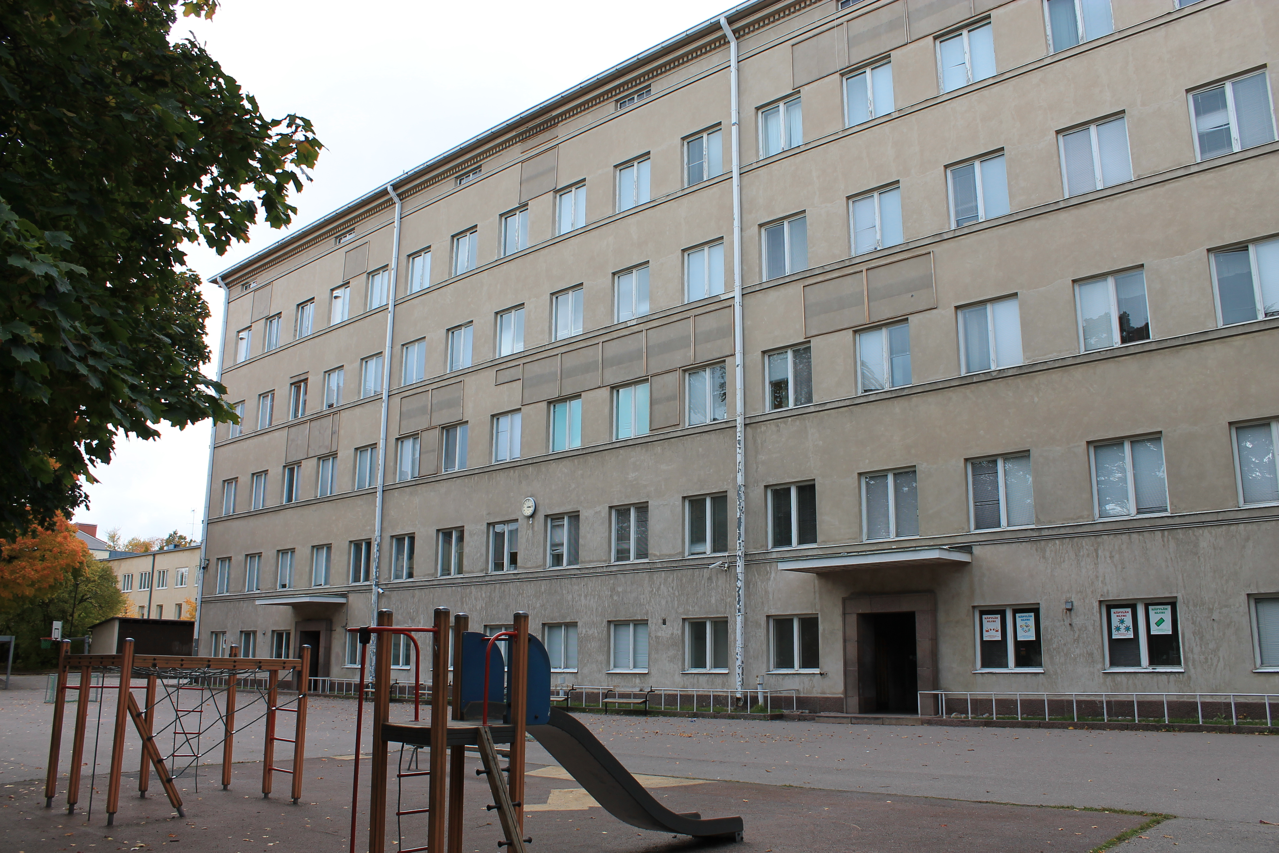 Käpylän peruskoulun Väinölän rakennus.